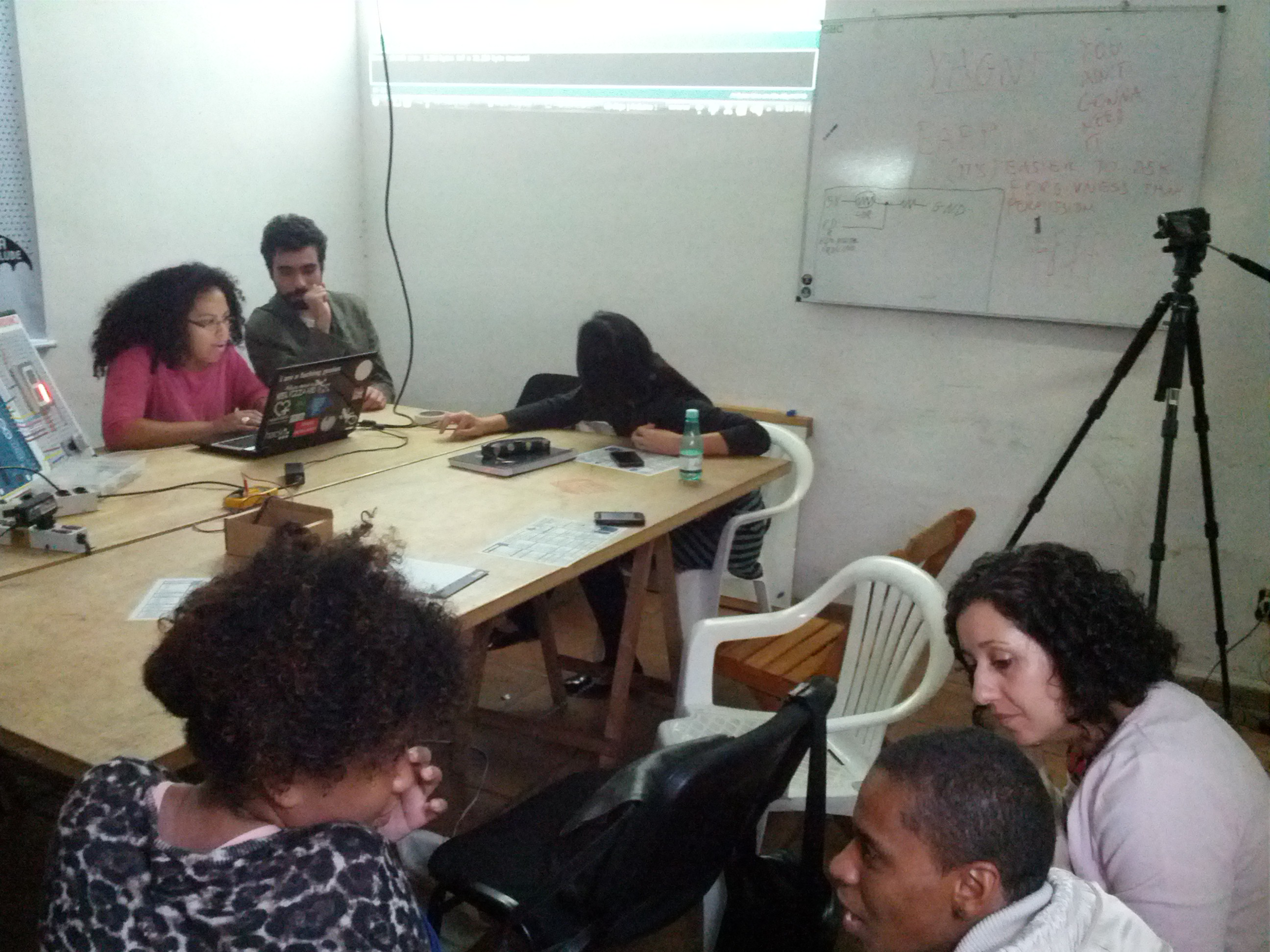 Visita da primeira metade da turma do curso Educação, Direitos Humanos e Tecnologias ao Garoa Hacker Clube, em maio de 2014, onde além de conhecerem o hackerspace participaram de um dojo de arduíno.